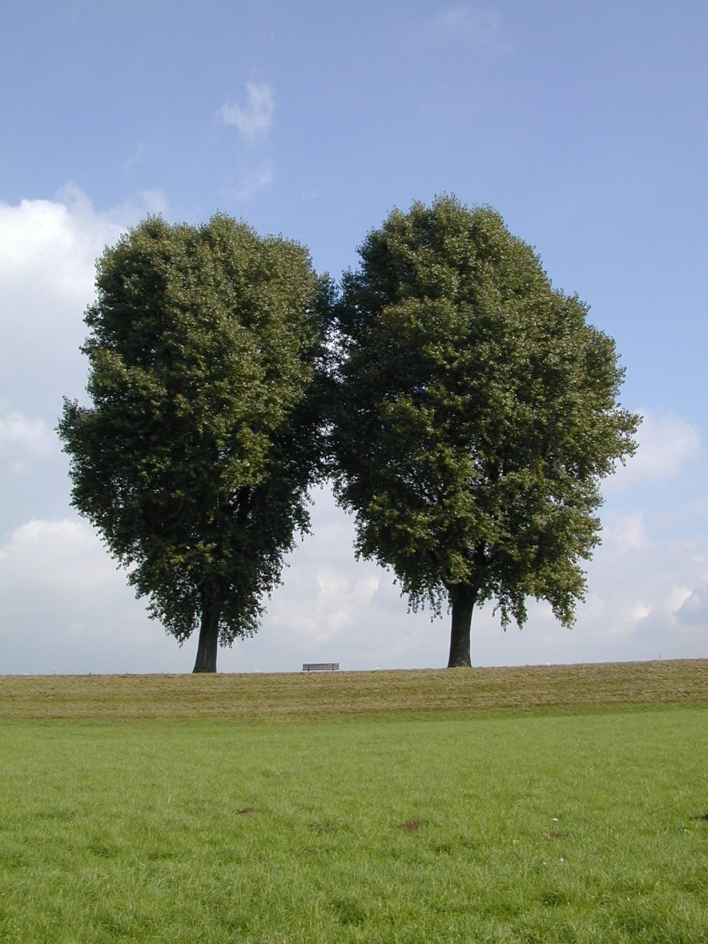 Trees Rhine Park, Golzheim, Düsseldorf, Germany